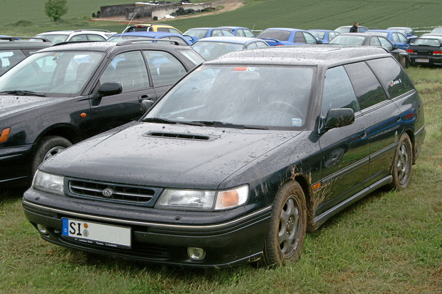 Subaru Legacy Typ BC/BJF Subaru Legacy Baureihe BC/BJF. Das abgebildete Auto ist ein Kombimodell mit 2.0 Liter Turbomotor (erkennbar an der Hutze auf der Motohaube)